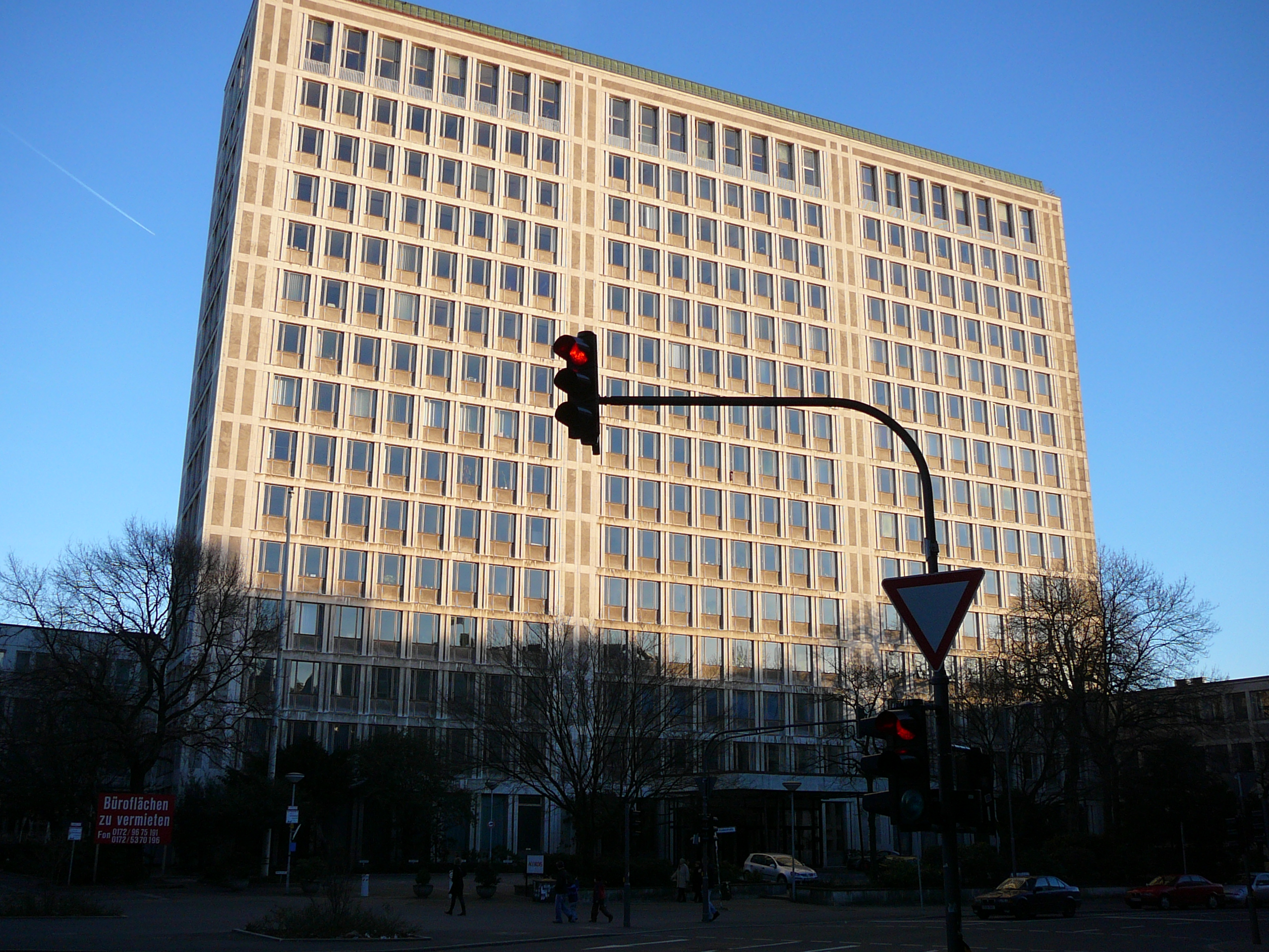 Herzogstr. Glanzstoff-Hochhaus, Wuppertal